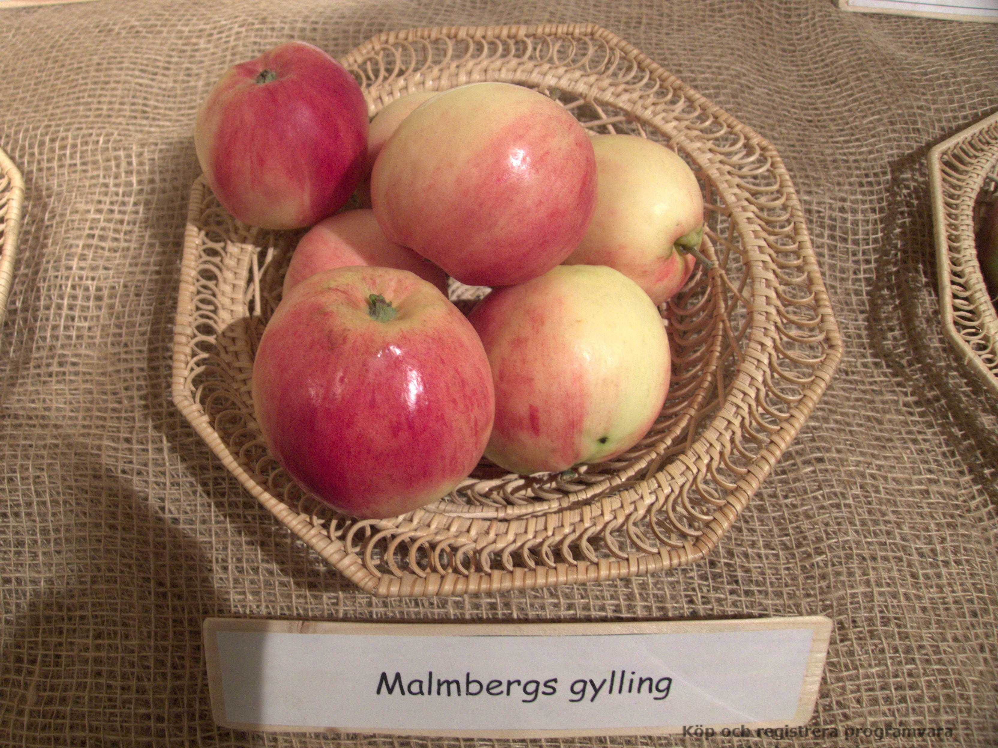 Äpplen av sorten